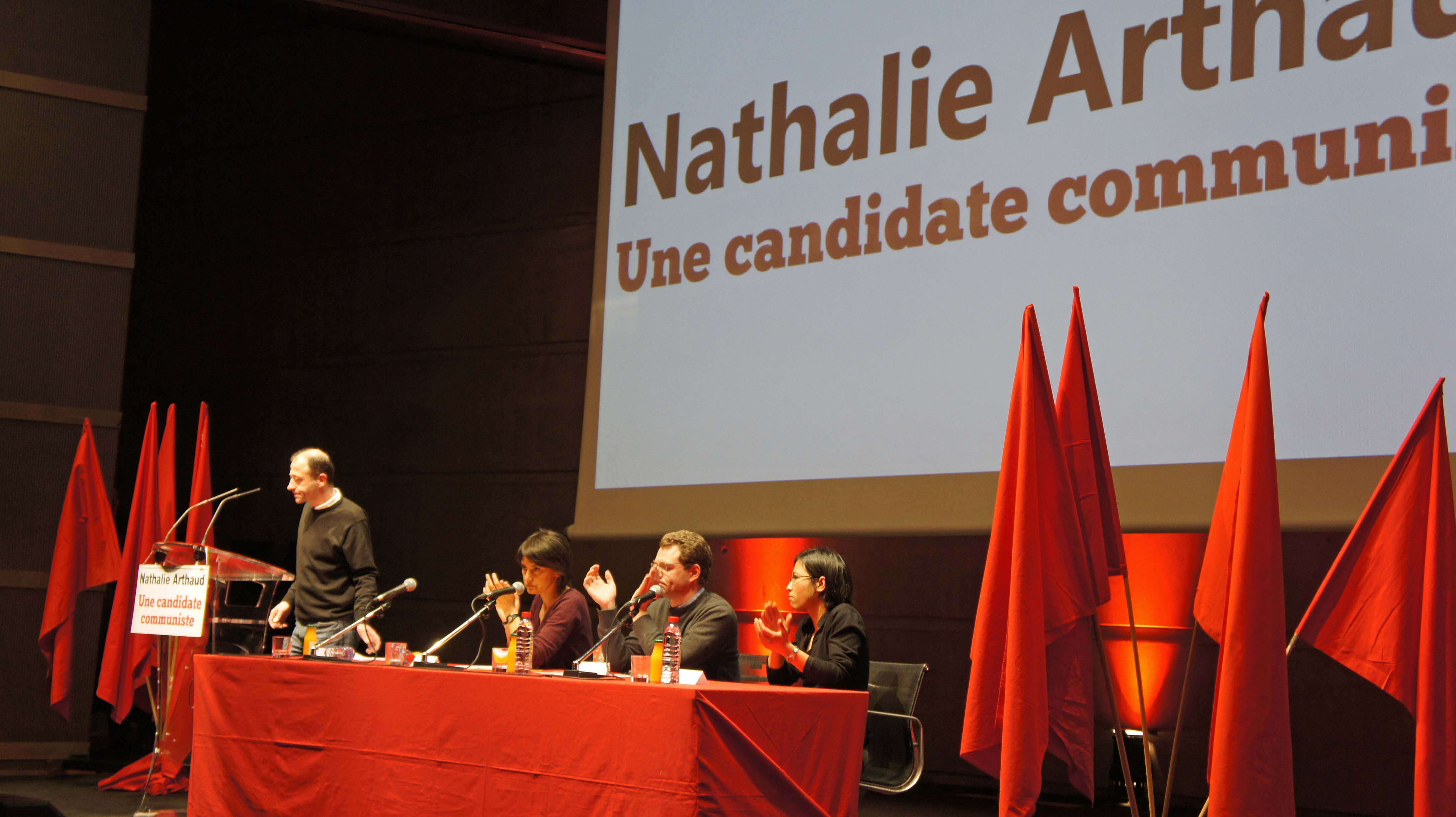 Nathalie Arthaud à la réunion de Reims pour la candidate à l'élection présidentielle 2012.